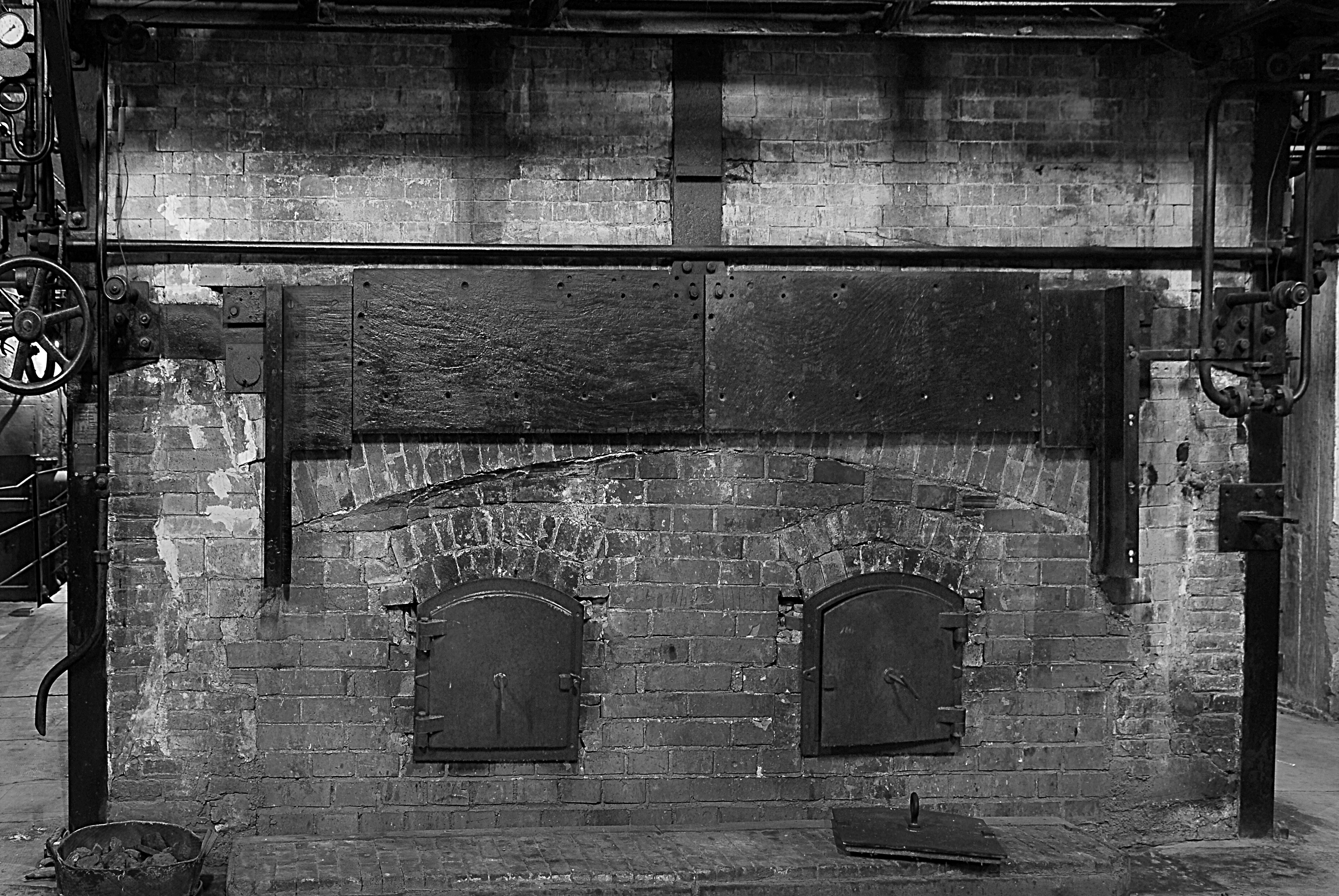 La Tèrmica de la Fàbrica Roca Umbert (Granollers)